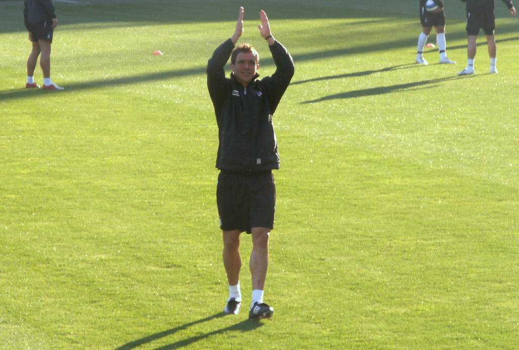 Serdar Kurtuluş - Beşiktaş Jimnastik Kulübü